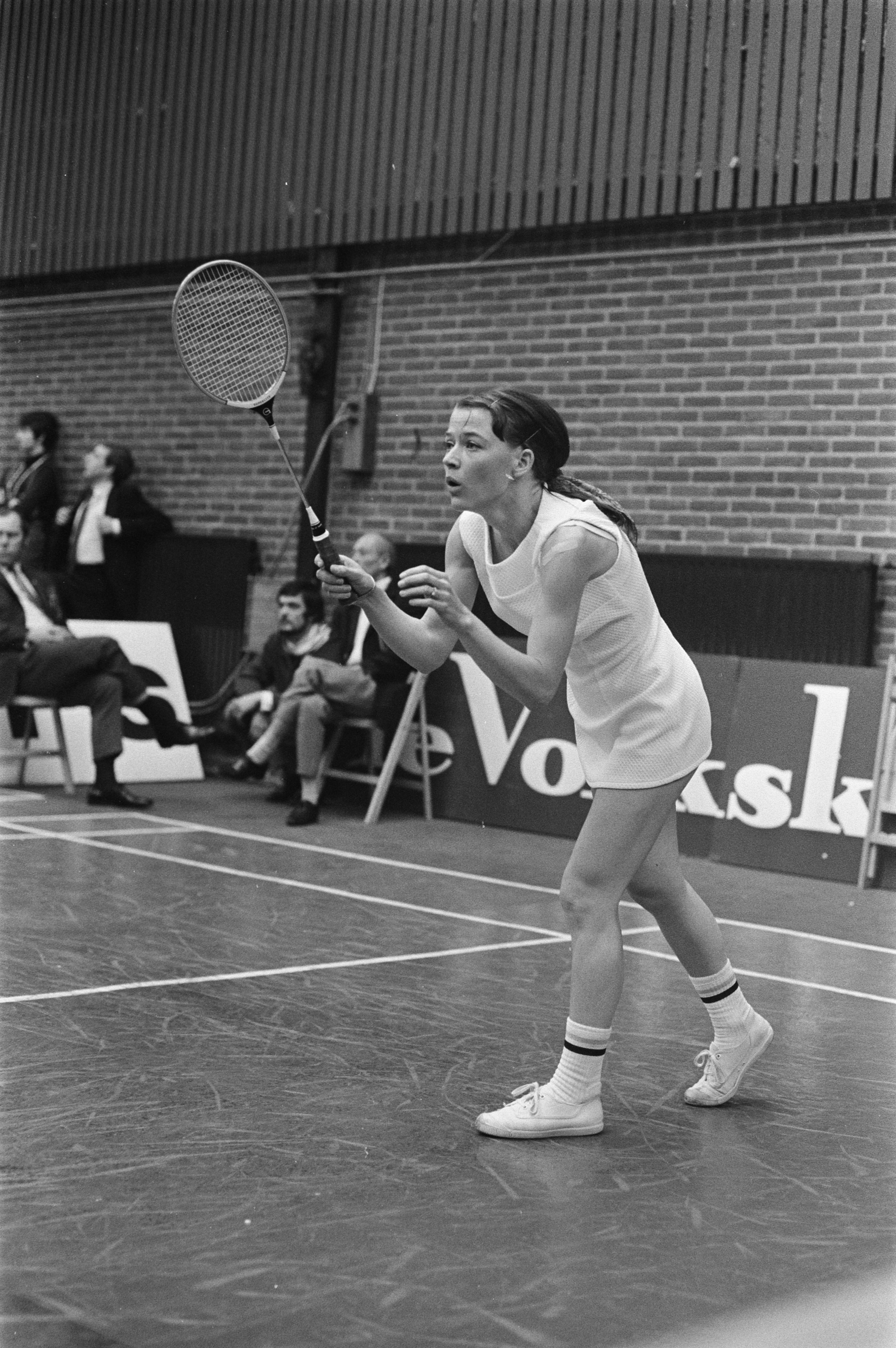 Collectie / Archief : Fotocollectie Anefo Reportage / Serie : [ onbekend ] Beschrijving : Internationale badmintonwedstrijden in Duinwijckhal Haarlem Spelmoment Datum : 15 februari 1970 Locatie : Haarlem Trefwoorden : badminton Persoonsnaam : Duinwijckhal Fotograaf : Verhoeff, Bert / Anefo Auteursrechthebbende : Nationaal Archief Materiaalsoort : Negatief (zwart/wit) Nummer archiefinventaris : bekijk toegang 2.24.01.05 Bestanddeelnummer : 923-2559 Reacties Geplaatst door Guus van der Vlugt op 07 maart 2016 - 19:34. Lonny Bostofte (Den)